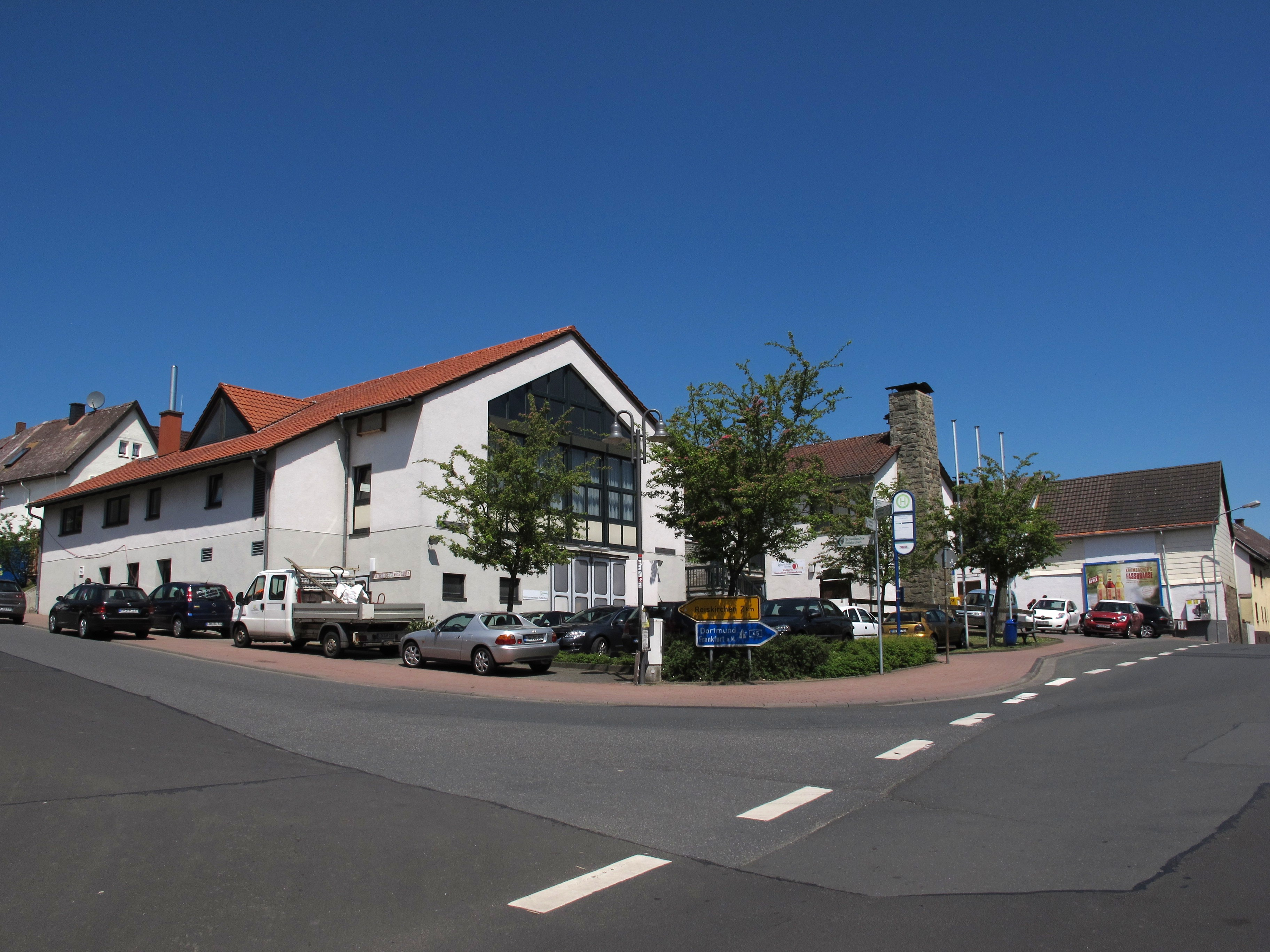 Dorfgemeinschaftshaus in Volpertshausen.